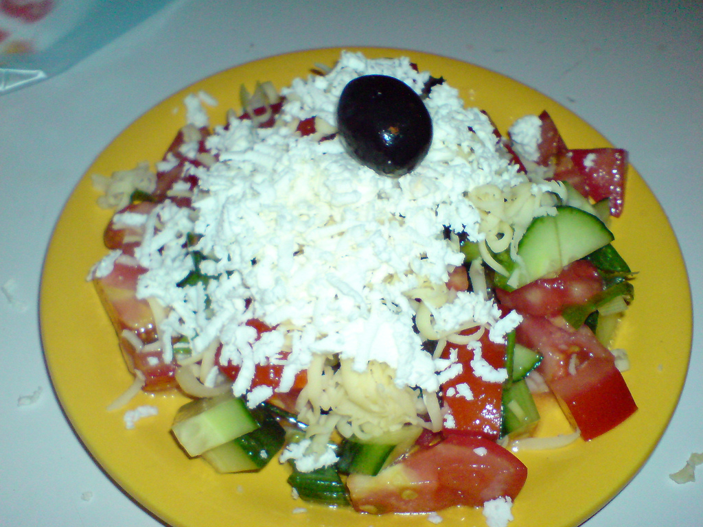 Шопска салата